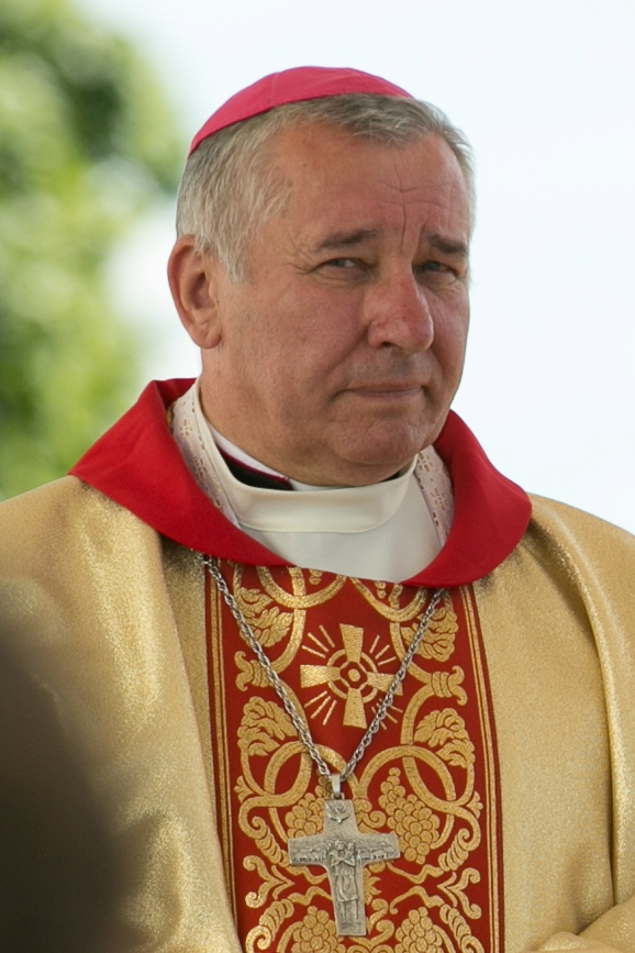 Bīskaps Edvards Pavlovskis